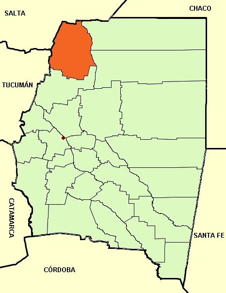 Mapa editado de: Santiago del Estero province (Argentina), departments and capital.png